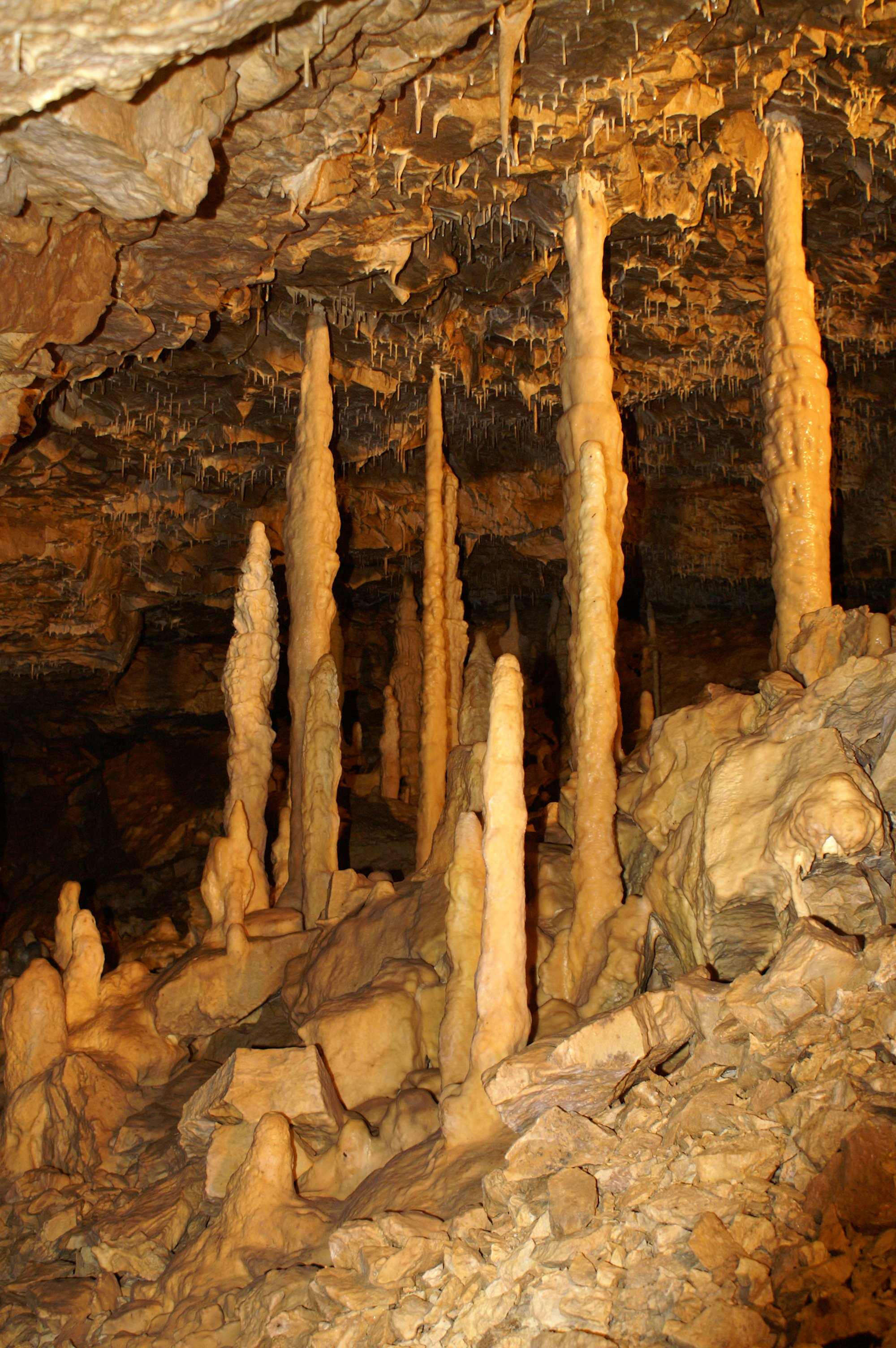 Die Hintere Kohlhaldehöhle in Heroldstatt-Sontheim auf der Schwäbischen Alb weist bizarre Tropfsteinsäulen auf.